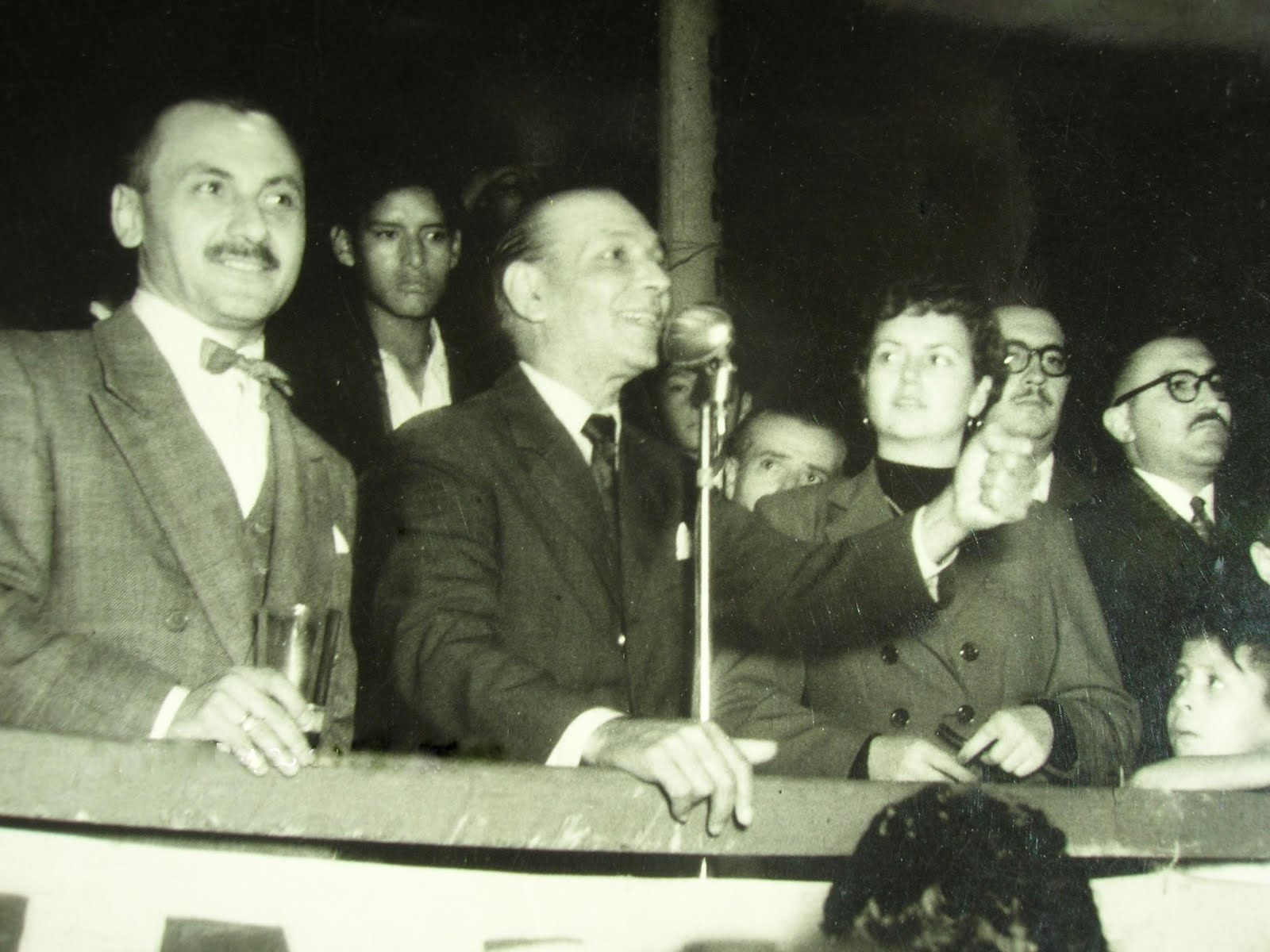 Cipriano Reyes (+/- 1955?). Dirigente sindical argentino.